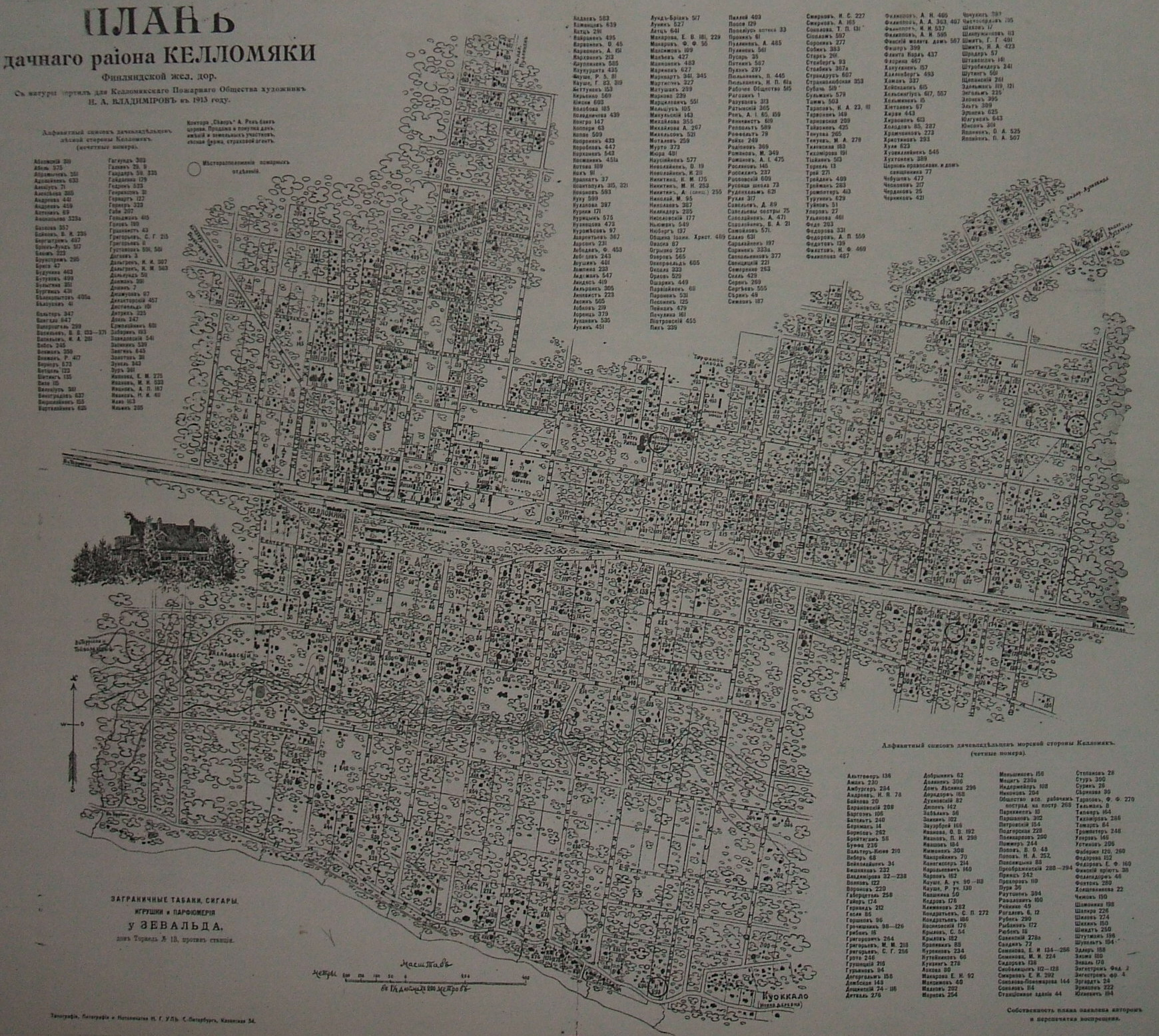 Музеи Курортного района Спб